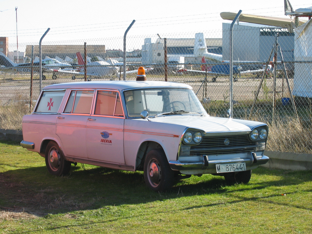 Antiguo modelo de ambulancia, SEAT 1500, de Iberia. Fotografiada en el aeródromo de Cuatro Vientos, Madrid, Spain.